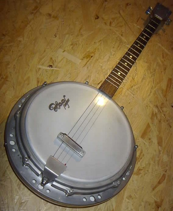 Tenorbanjo des deutschen Herstellers "Hopf" (vermutlich 60er Jahre) mit hinter dem Steg aufgeschraubten Dämpfer (eigenes Foto)